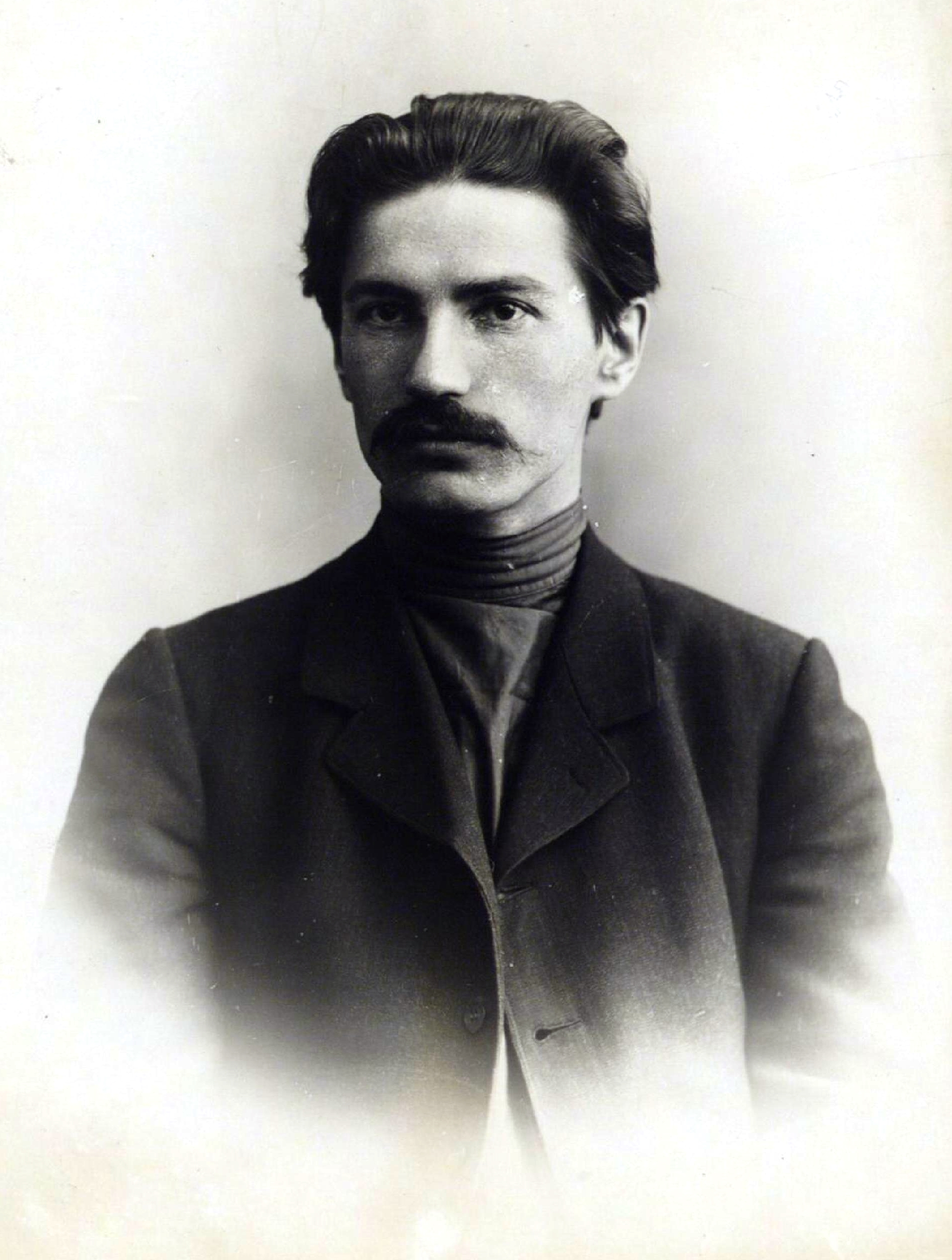 Романов, Иван Романович